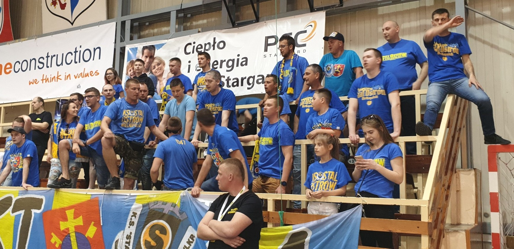 Kibice Stali Ostrów Wlkp